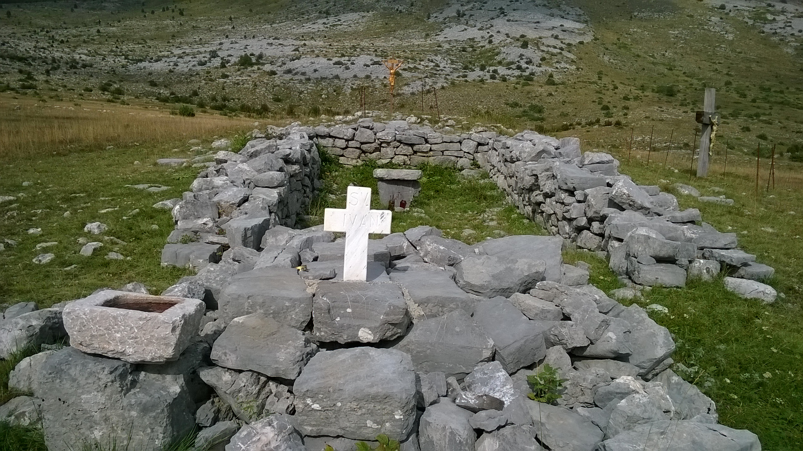 Temelji kapelice Sv. Ivana na Libinju